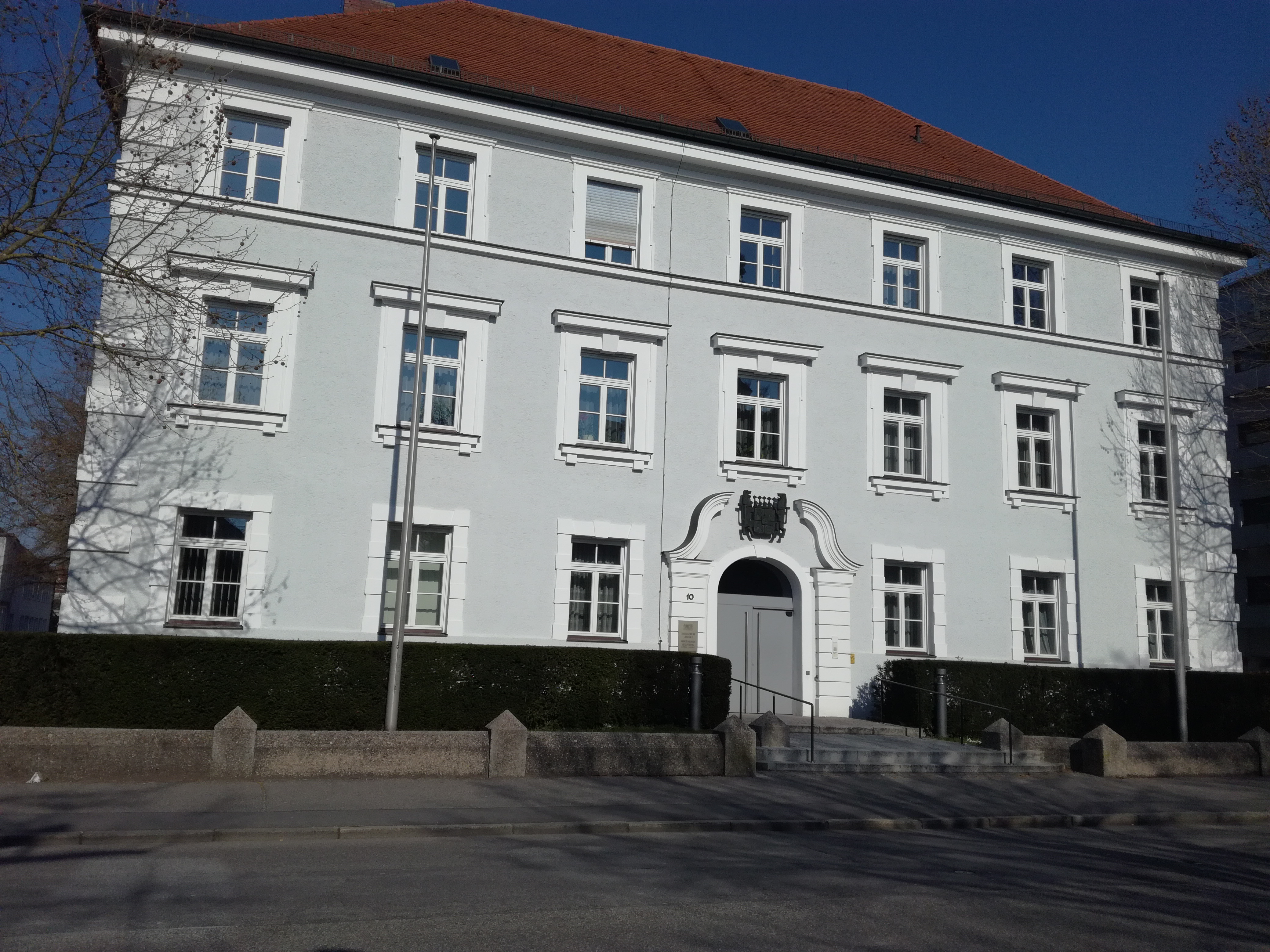 Sozialgericht Landshut sowie Kammer Landshut des Arbeitsgerichts Regensburg, Seligenthaler Str. 10, Landshut